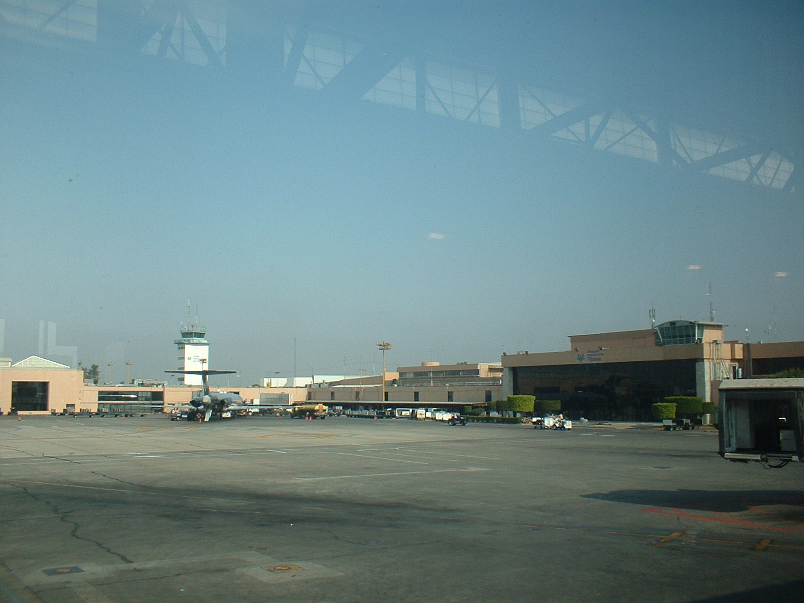 Tijuana Airport